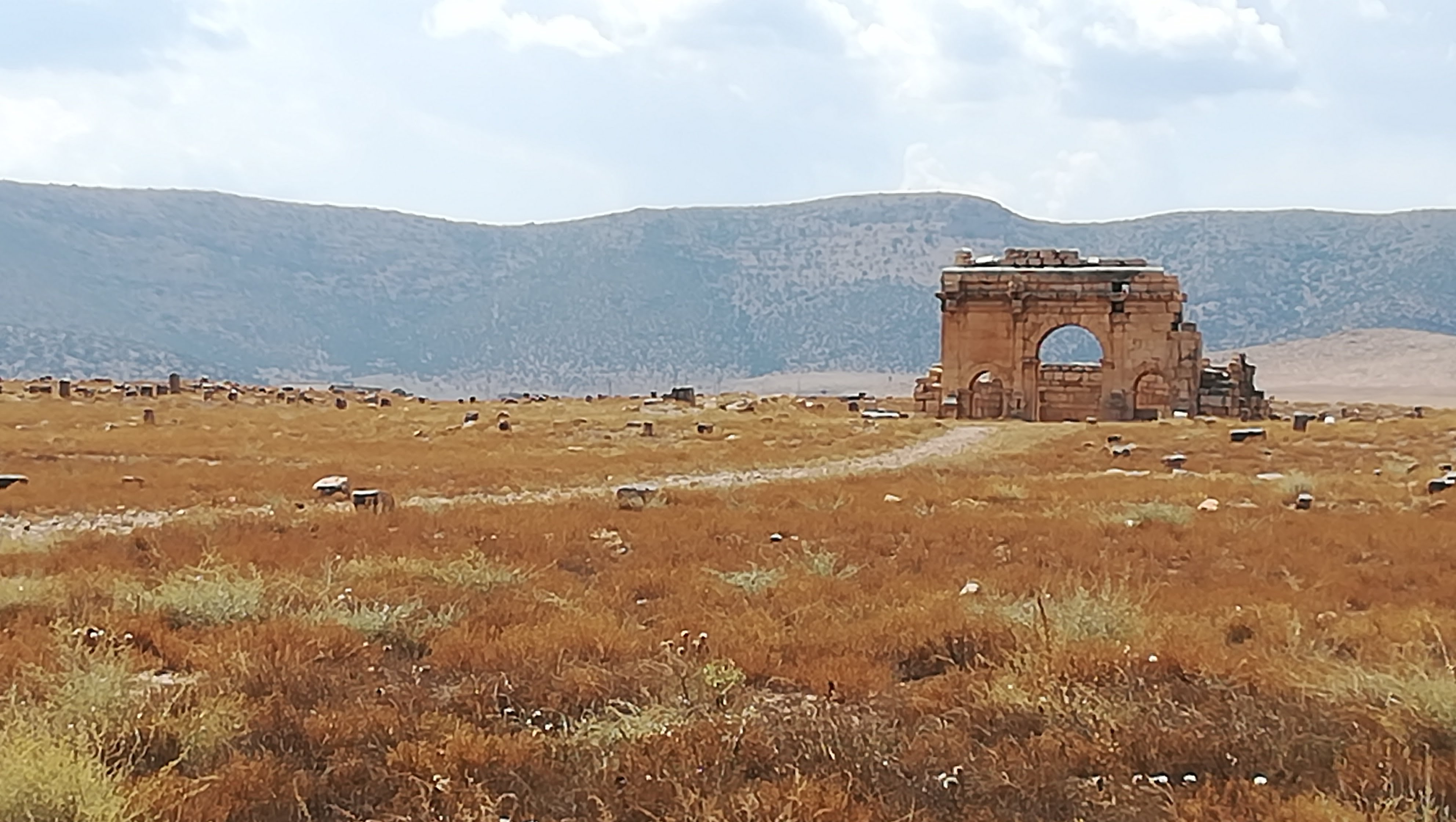 موقع أثري روماني ببلدية زانة ولاد السبع بباتنة